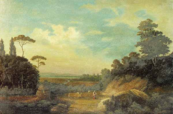 Italienische Landschaft mit einer weiblichen Person in Tracht auf einer alten Brücke